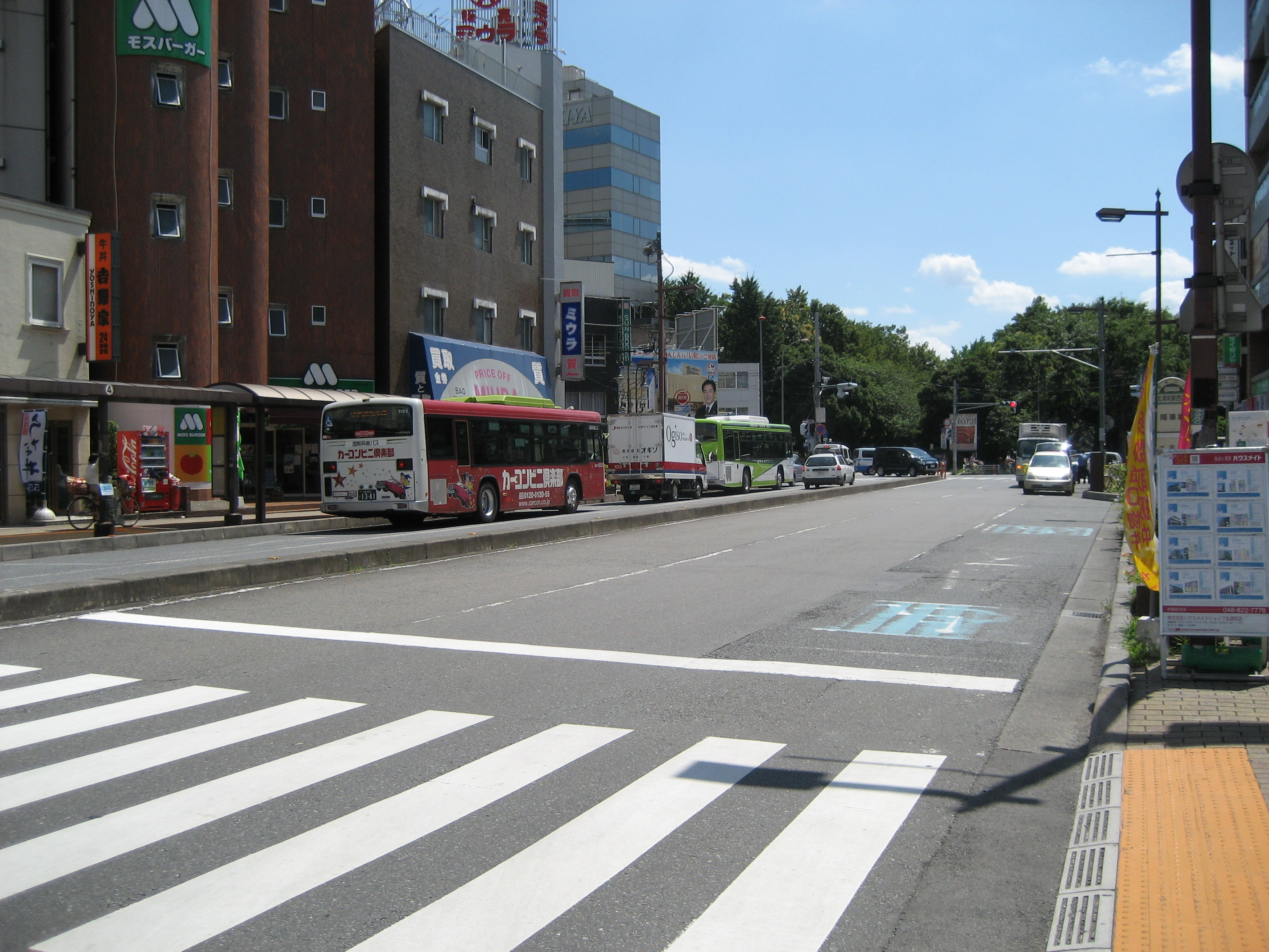 埼玉県道118号線さいたま市浦和区北浦和公園方向を撮影